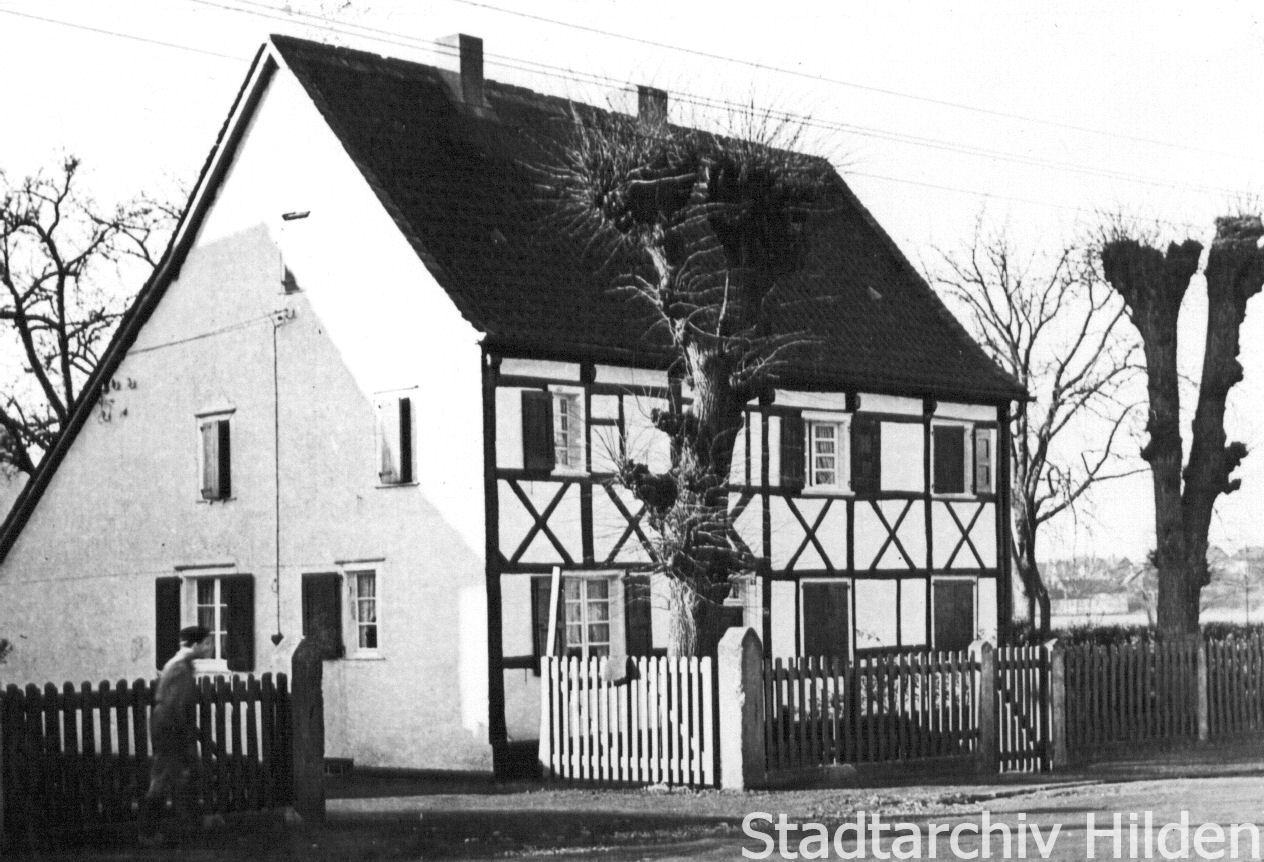 Bild des Fachwerkhauses "Pungshaus" in Hilden, Grünstr. 22This is a photograph of an architectural monument.